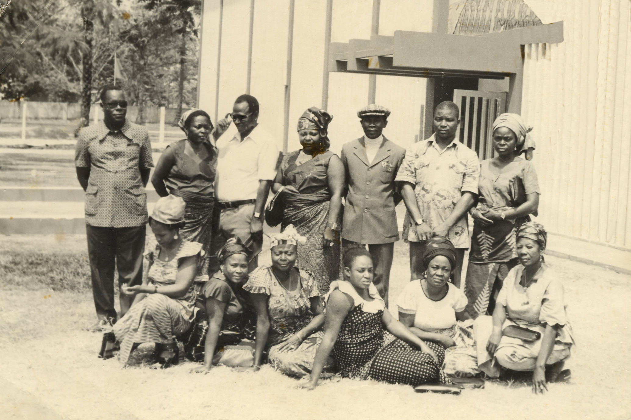 Le groupe de personnes qui accompagnaient l'émission Bakolo Miziki pour danser à la télévision congolaise en 1977